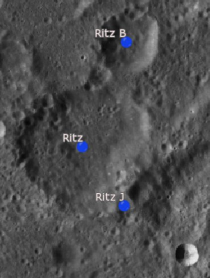 Cráter lunar Ritz. Cráteres satélite. (Imagen LRO)